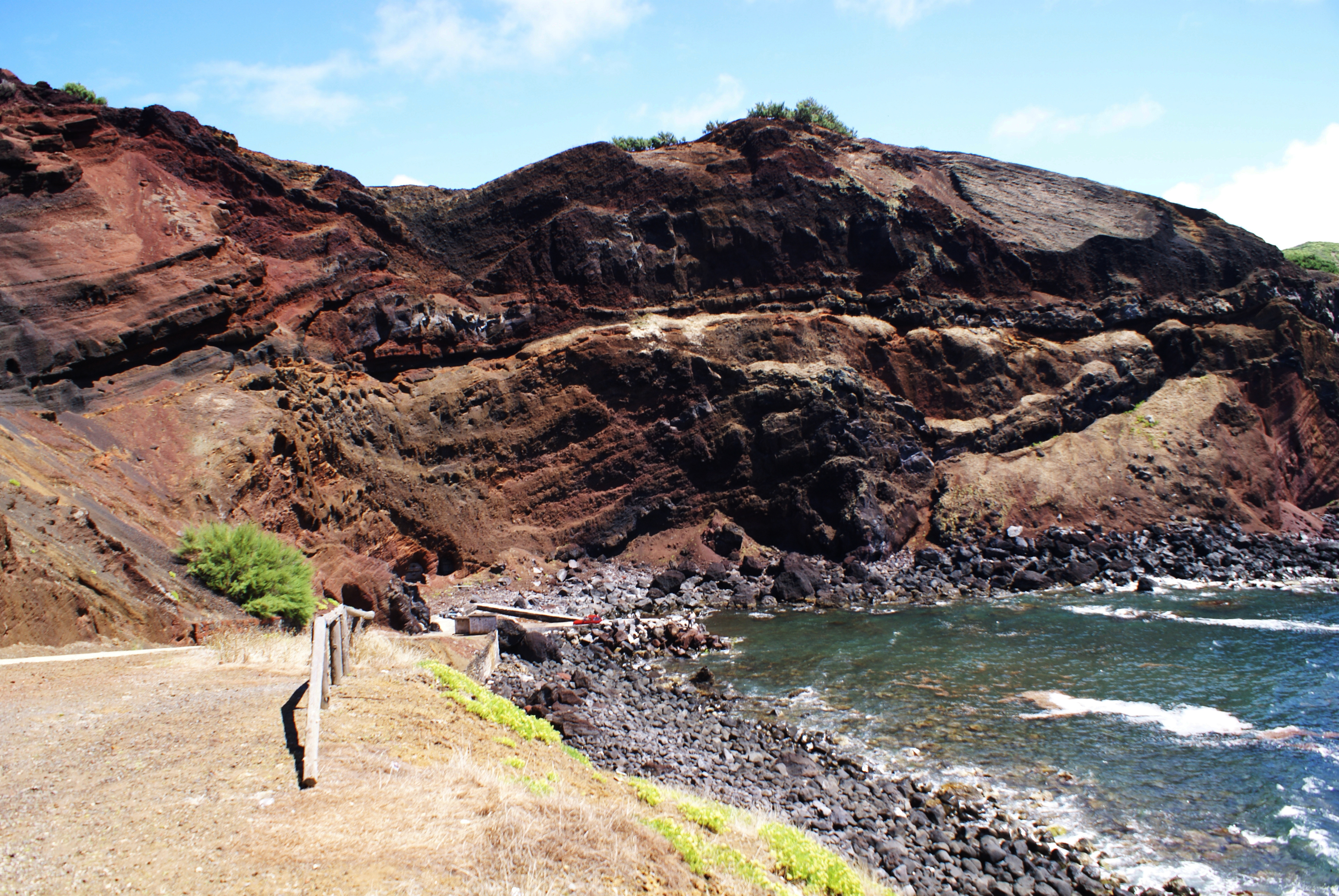 Porto Afonso, Formação geológica das falésias, Santa Cruz da Graciosa, ilha Graciosa, Açores, Portugal